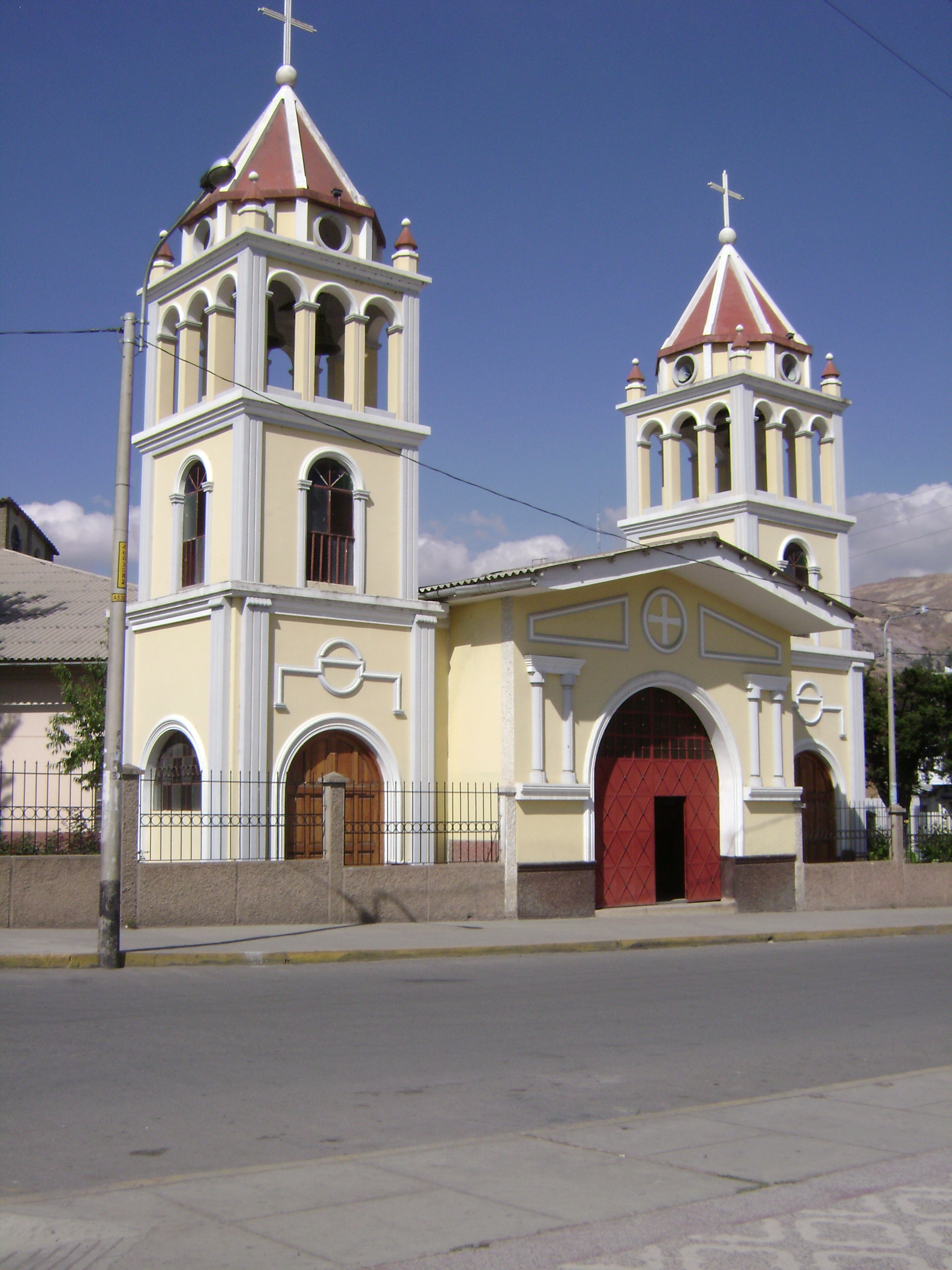 Iglesia ubicada en la Plaza Belén en la ciudad de Huaraz-Perú.